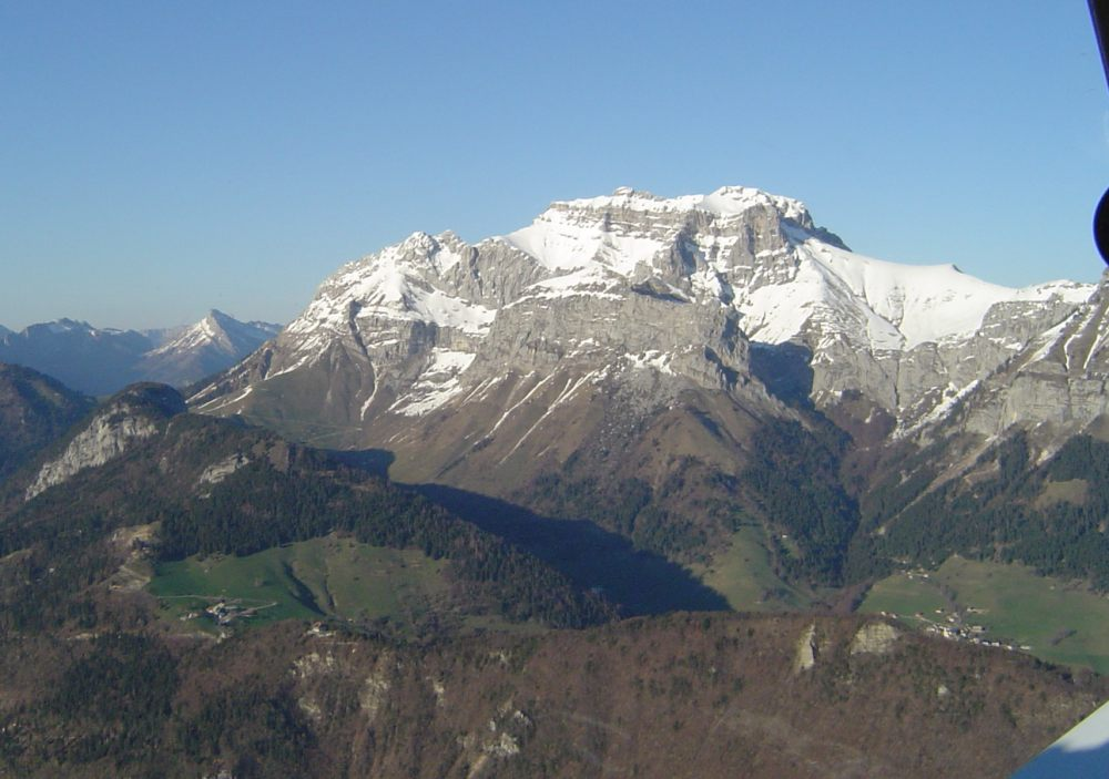 La Tournette (2 351 m), sommet le plus élevé du massif des Bornes. Photographie aérienne, vue depuis l'ouest, au-dessus du lac d'Annecy. On devine au premier-plan (à gauche du centre de la photo) le Col de la Forclaz.